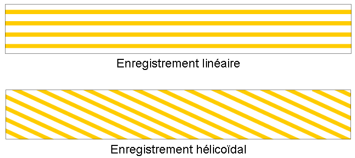 bande magnétique : organisation physique.